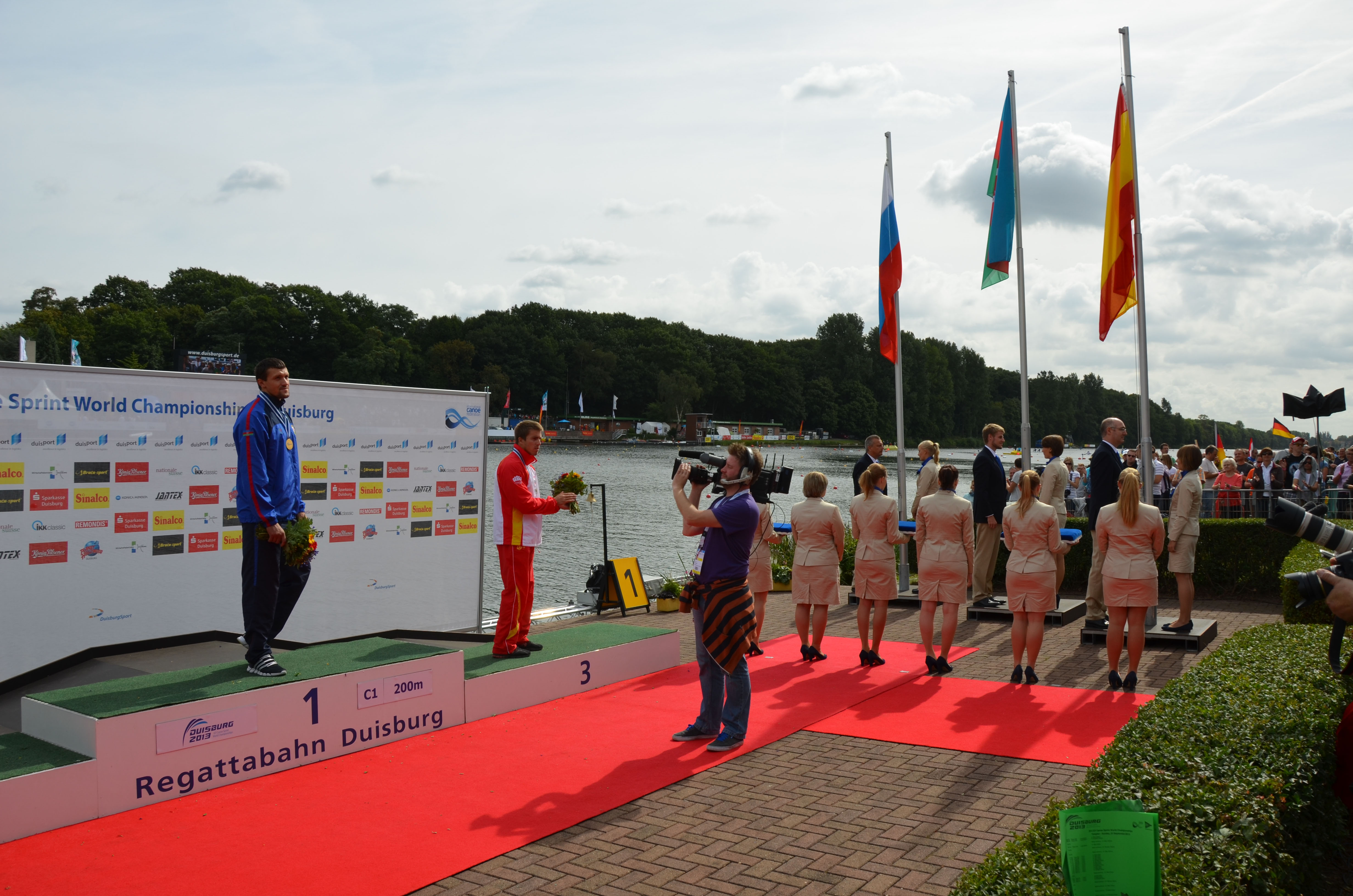 2013 ICF Canoe Sprint World Championships in Duisburg - Alle Ergebnisse/Teilnehmer unter: Gewinner: AZE - AZERBAIJAN DEMYANENKO, Valentin RUS - RUSSIA SHTYL, Ivan ESP - SPAIN BENAVIDES LOPEZ DE AYALA, Alfonso